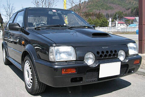 Nissan March SUPER TURBO ( E-EK10GFR )